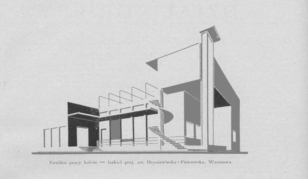 Anatolia Hryniewicka-Piotrowska (1896-1989), projekt Pawilonu Pracy Kobiet na Powszechną Wystawę Krajową w Poznaniu (1929)